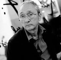 Ritratto di Gianluca Nicoletti